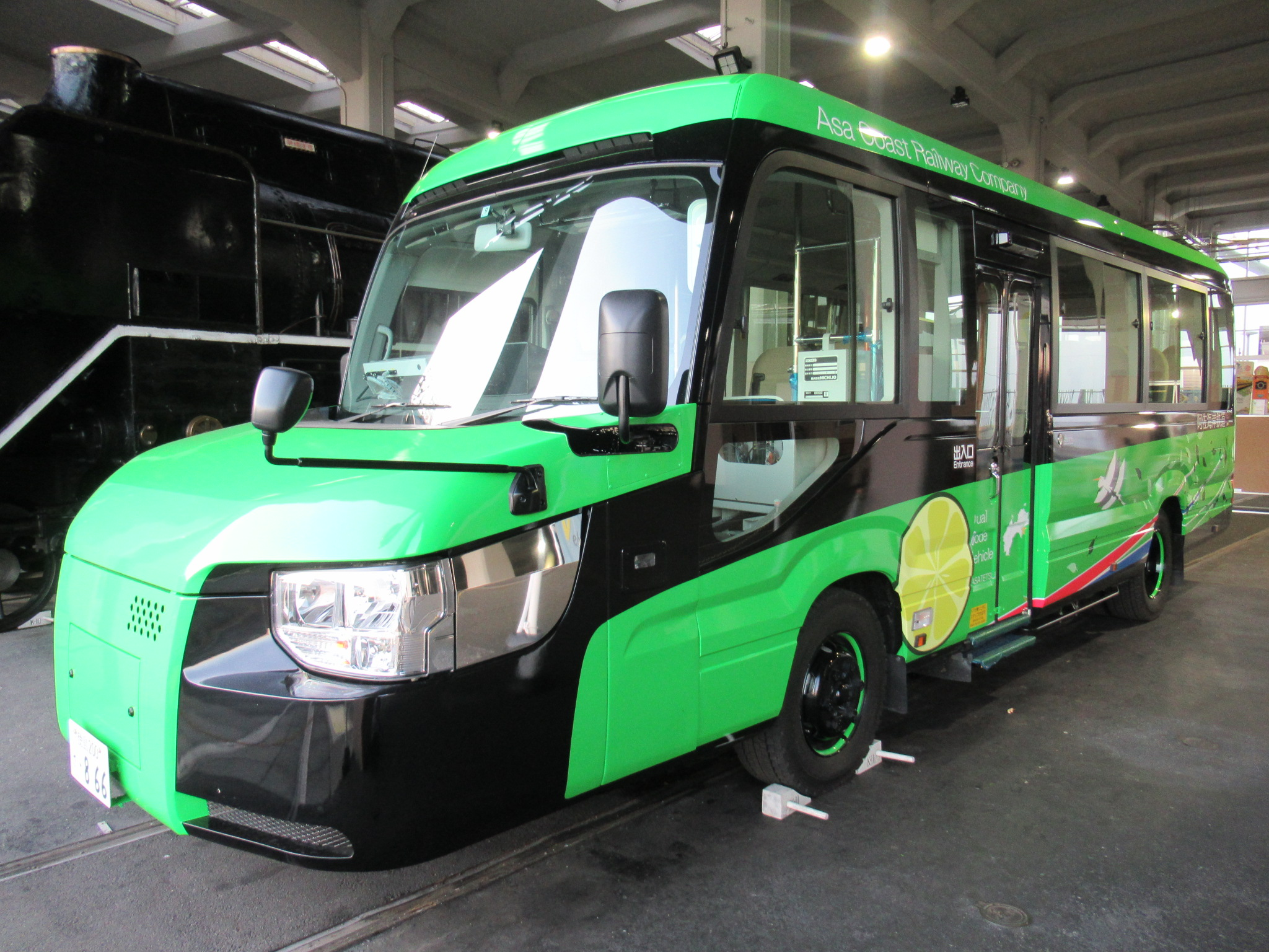 京都鉄道博物館にて展示中の阿佐海岸鉄道 DMV2号車